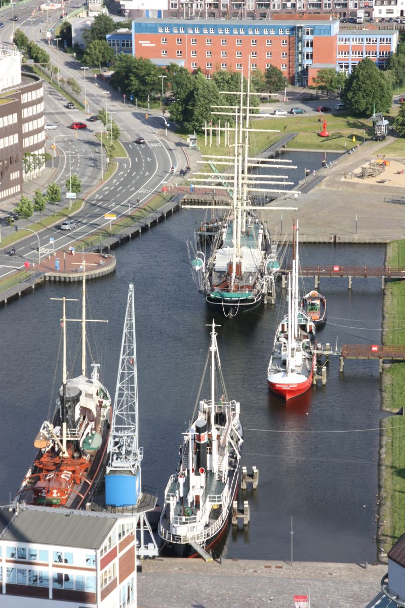 Bremerhaven der Museumshafen, ehemaliger Fischereihafen